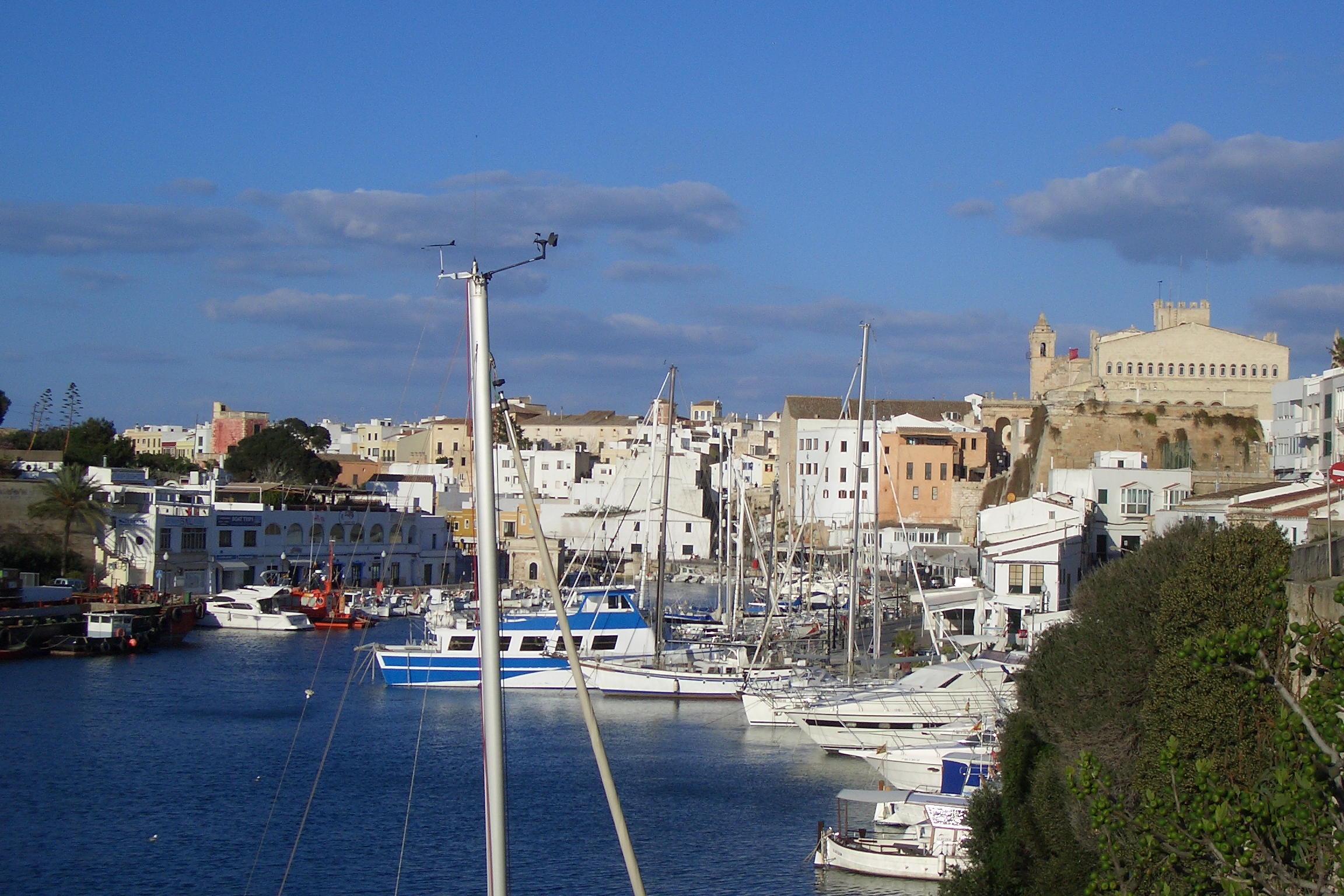 Foto del port de Ciutadella (Menorca) amb el port i la Catedral al fons.